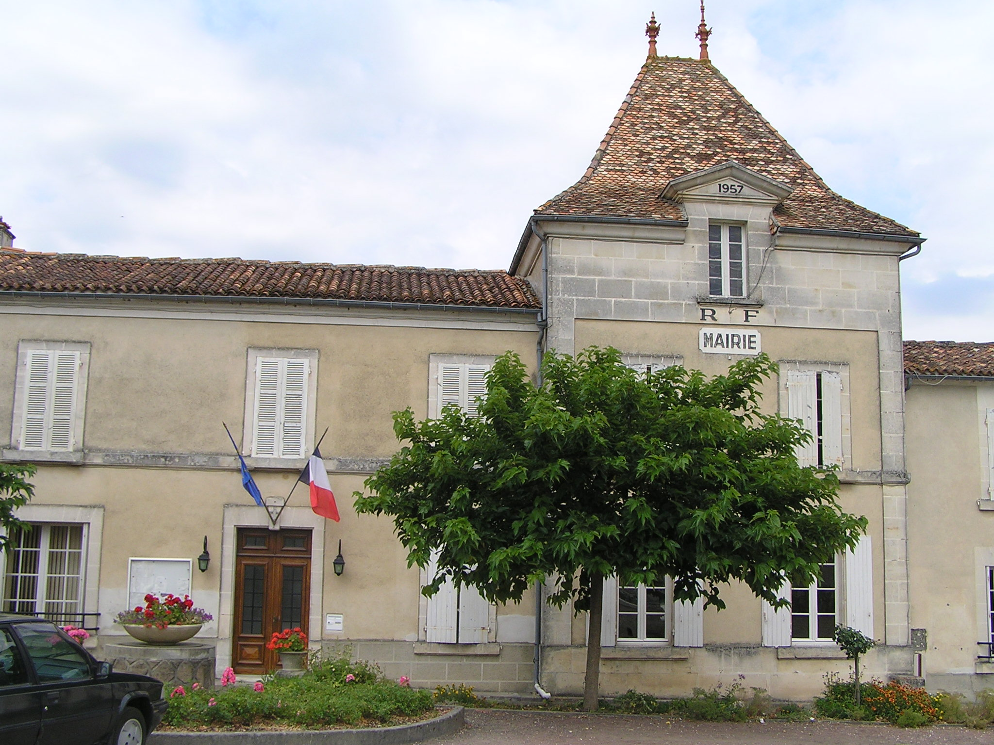 mairie de Juillac-le-coq